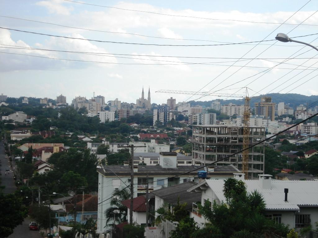 Vista da zona norte de Santa Cruz do Sul